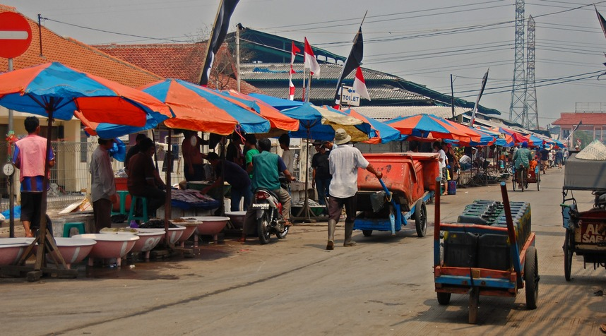 Fish trader, Muara Angke, Jakarta, Indonesia